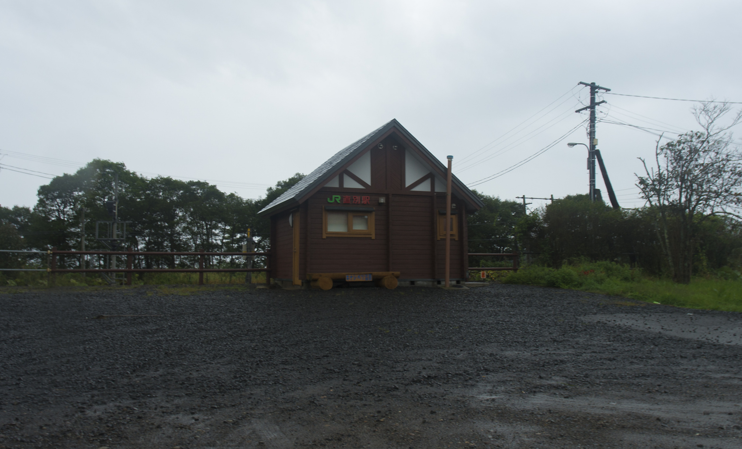 北海道旅客鉄道株式会社根室本線直別駅